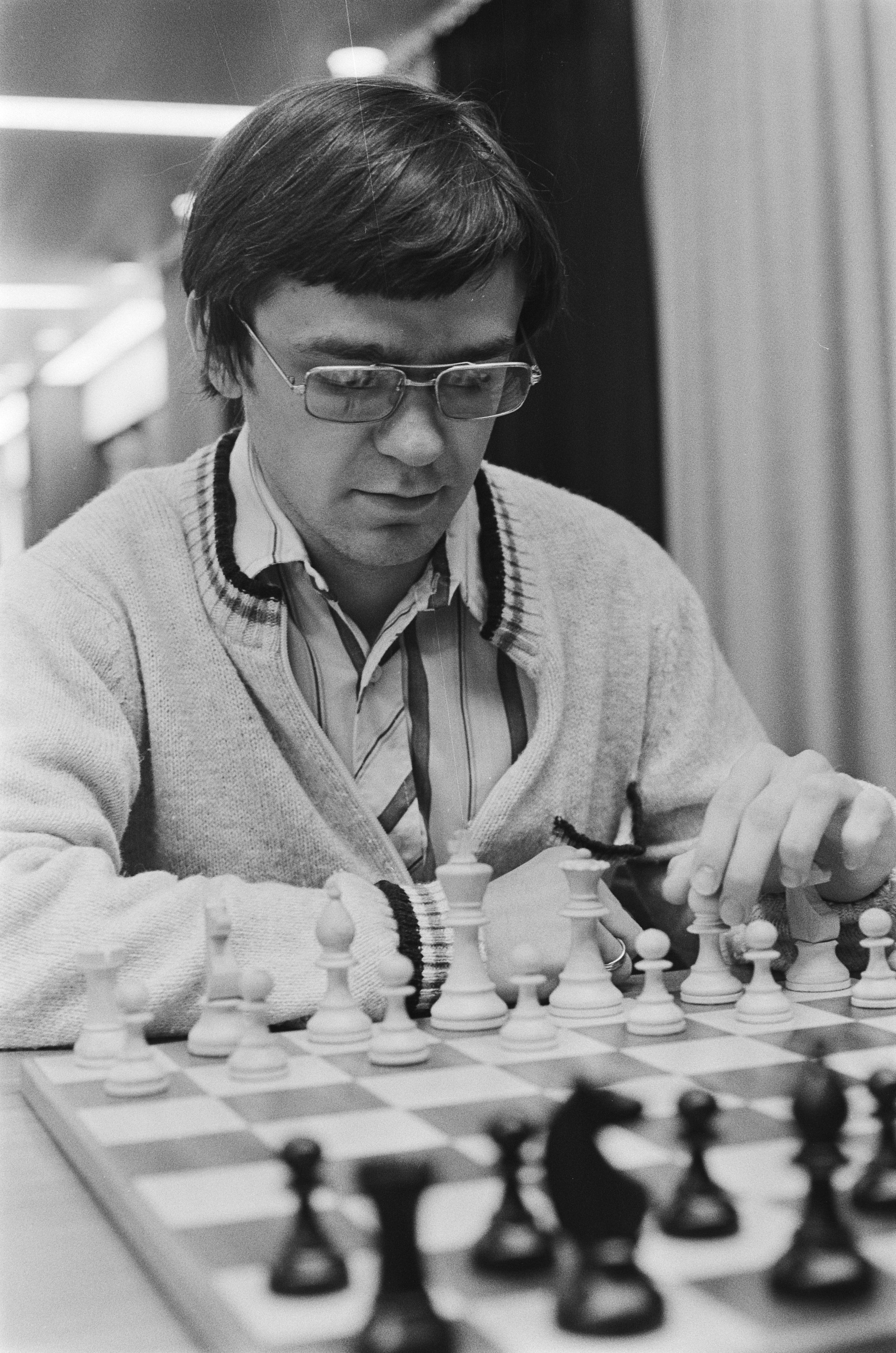 Collectie / Archief : Fotocollectie Anefo Reportage / Serie : [ onbekend ] Beschrijving : Interpolis schaaktoernooi 1e ronde; nr. 15, 16 Dzindzindasjvili, nr. 17, 18 Zoltan Ribli Datum : 1 september 1978 Trefwoorden : schaken Fotograaf : Suyk, Koen / Anefo Auteursrechthebbende : Nationaal Archief Materiaalsoort : Negatief (zwart/wit) Nummer archiefinventaris : bekijk toegang 2.24.01.05 Bestanddeelnummer : 929-8814